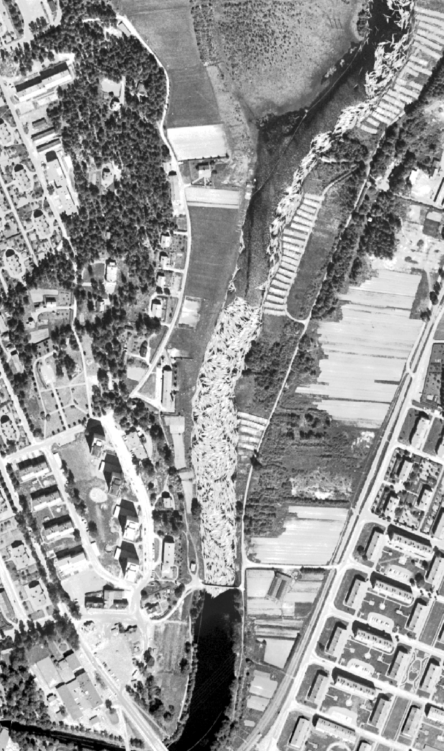 Flygfoto över Hagfors, bilden är tagen någon gång mellan 1955-1965. Bilden är inzoomad mot Hagälven och flottningen av timmer. Från originalbilden: File:Hagfors flygfoto 1960.png.